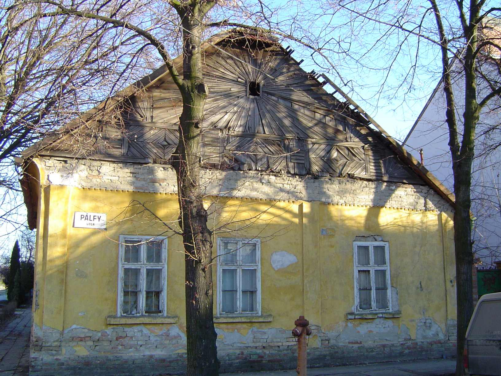 Régi napsugaras ház, épült 1884-ben, elbontva 2004 után (Szeged-Alsóváros, Pálfy utca)